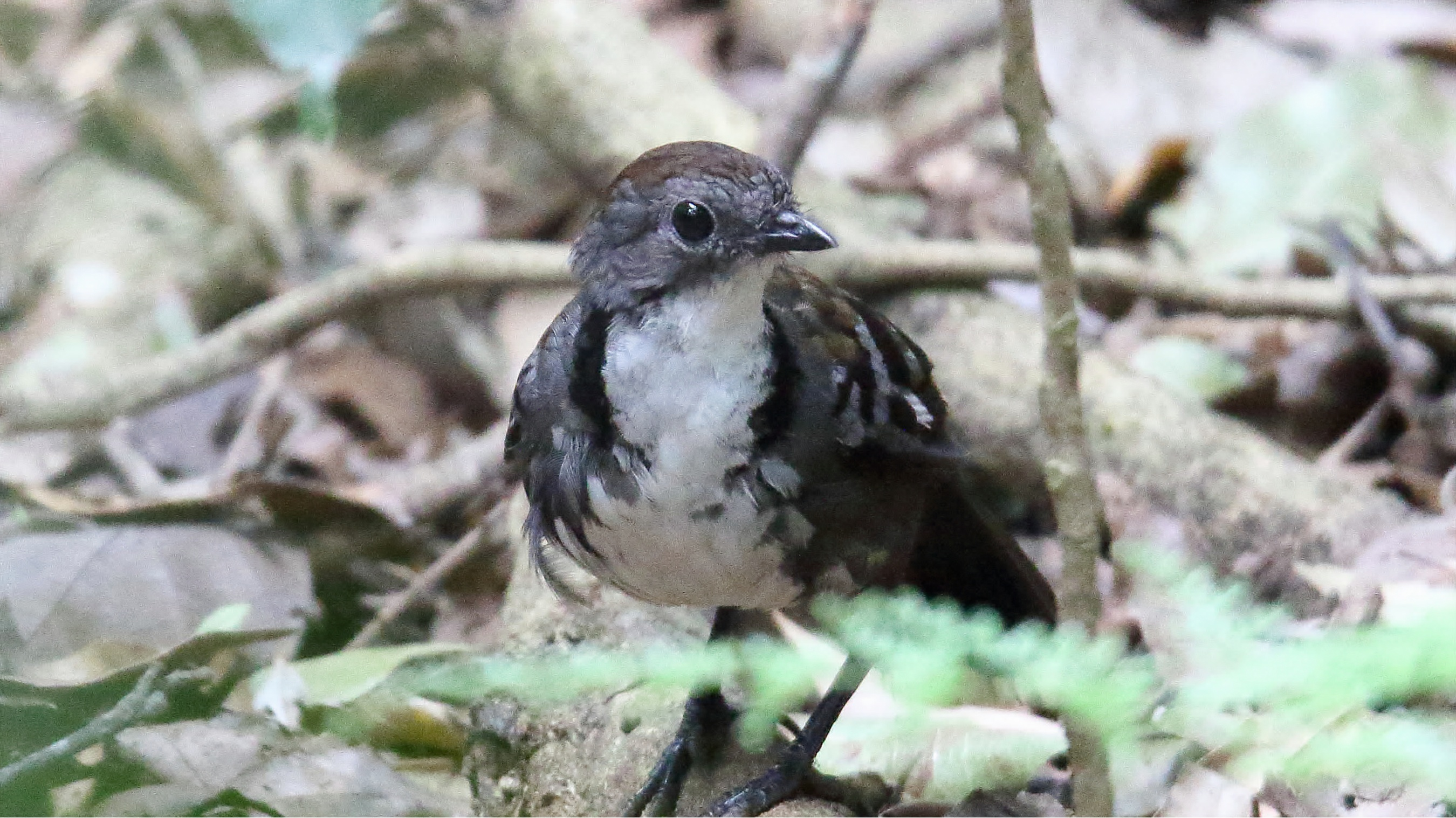 male